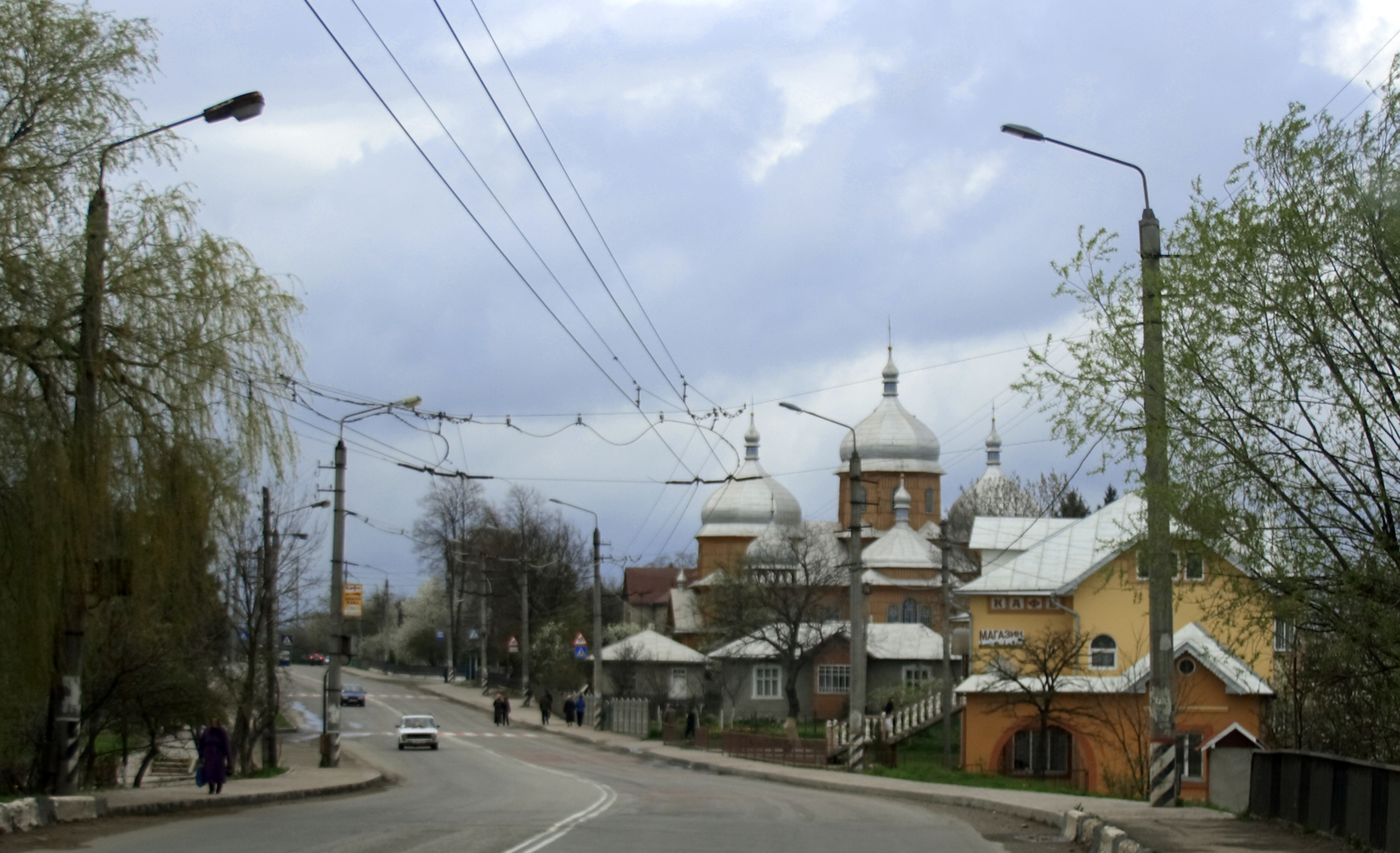 Село Ямница в Ивано-Франковской области